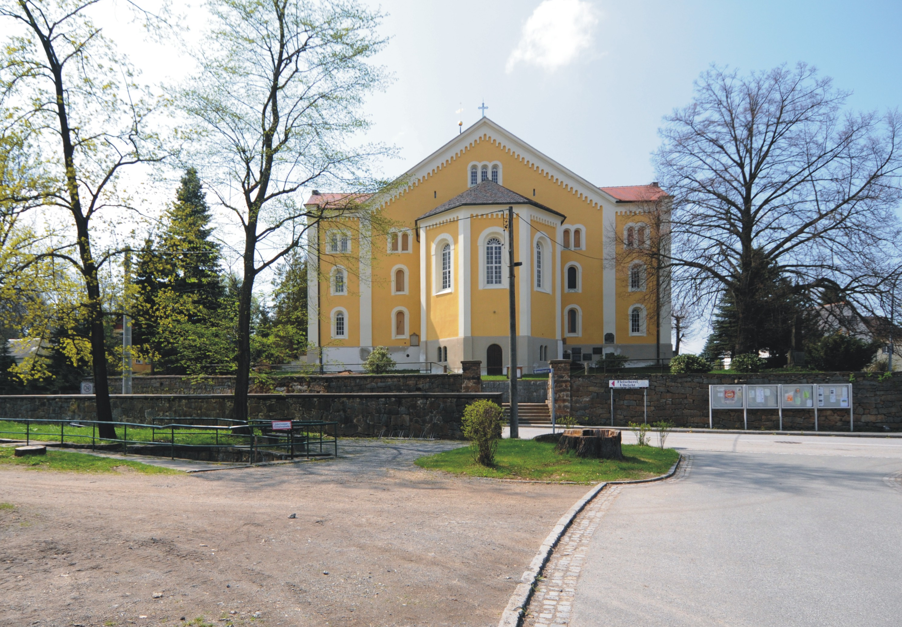 Steinigtwolmsdorf, Evangelische Pfarrkirche (Sachsen, Deutschland)